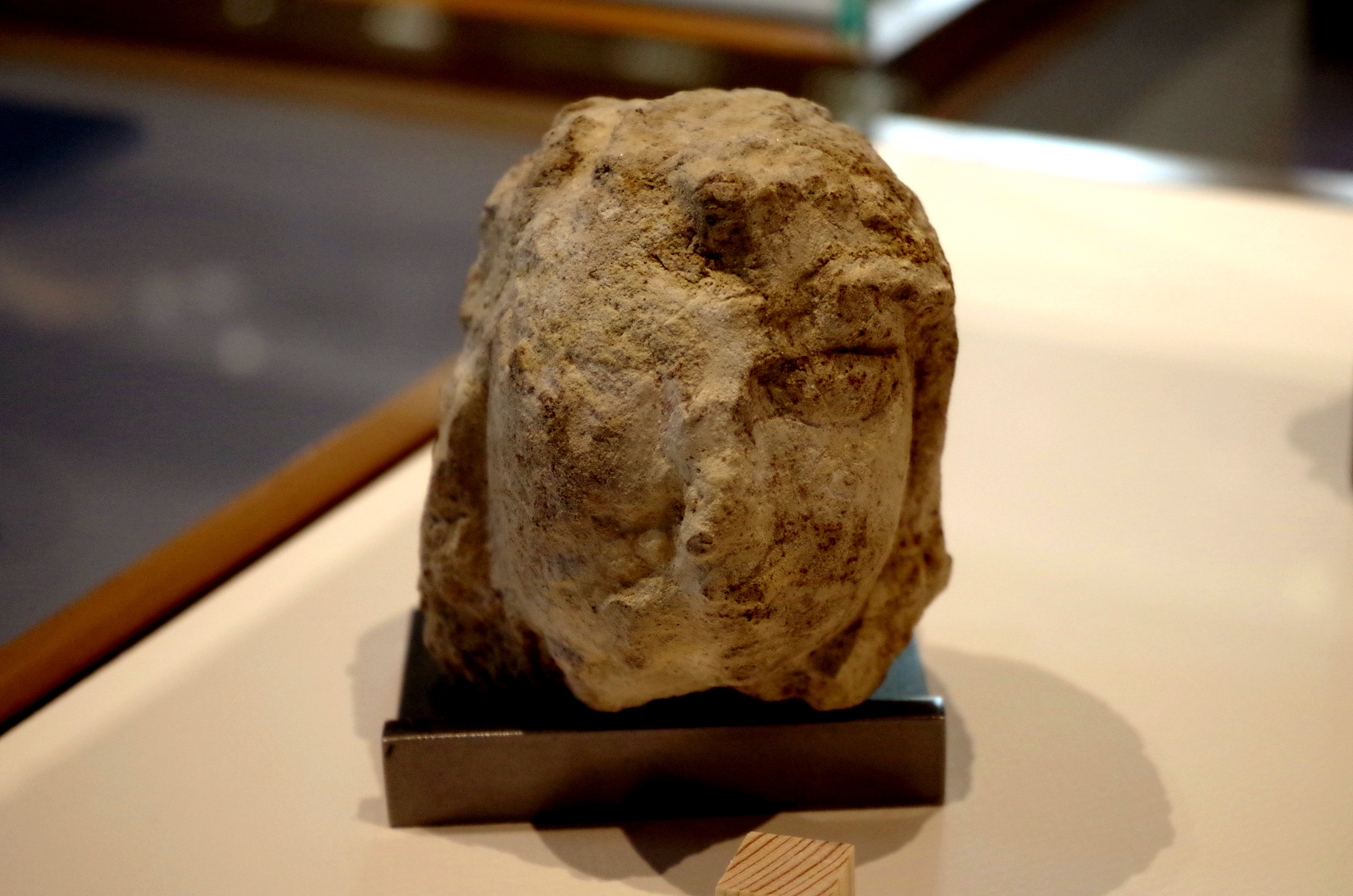 Statuette féminine trouvée à Amboise. Voir Jean-Marie Laruaz (dir.), Ambacia, la Gauloise - 100 objets racontent la ville antique d'Amboise, Chemillé-sur-Dême, Archéa, 2017, p. 118.